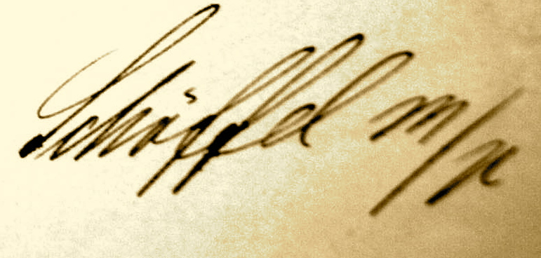 Unterschrift von Josef Schöffel, siehe Wiki (de).